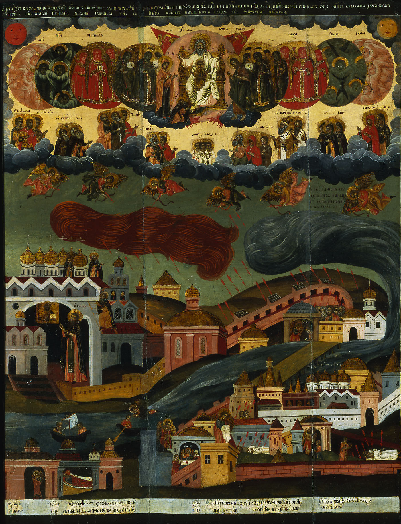 ВИДЕНИЕ ХУТЫНСКОГО ПОНОМАРЯ ТАРАСИЯ Конец XVII – начало XVIII века Новгород Дерево; темпера 93 х 77 Поступила в 1935 году из Антирелигиозного музея искусств Происхождение неизвестно Реставрирована в 1981 году в ГТГ Н.Г. Дивовой ГТГ Инв. 14966